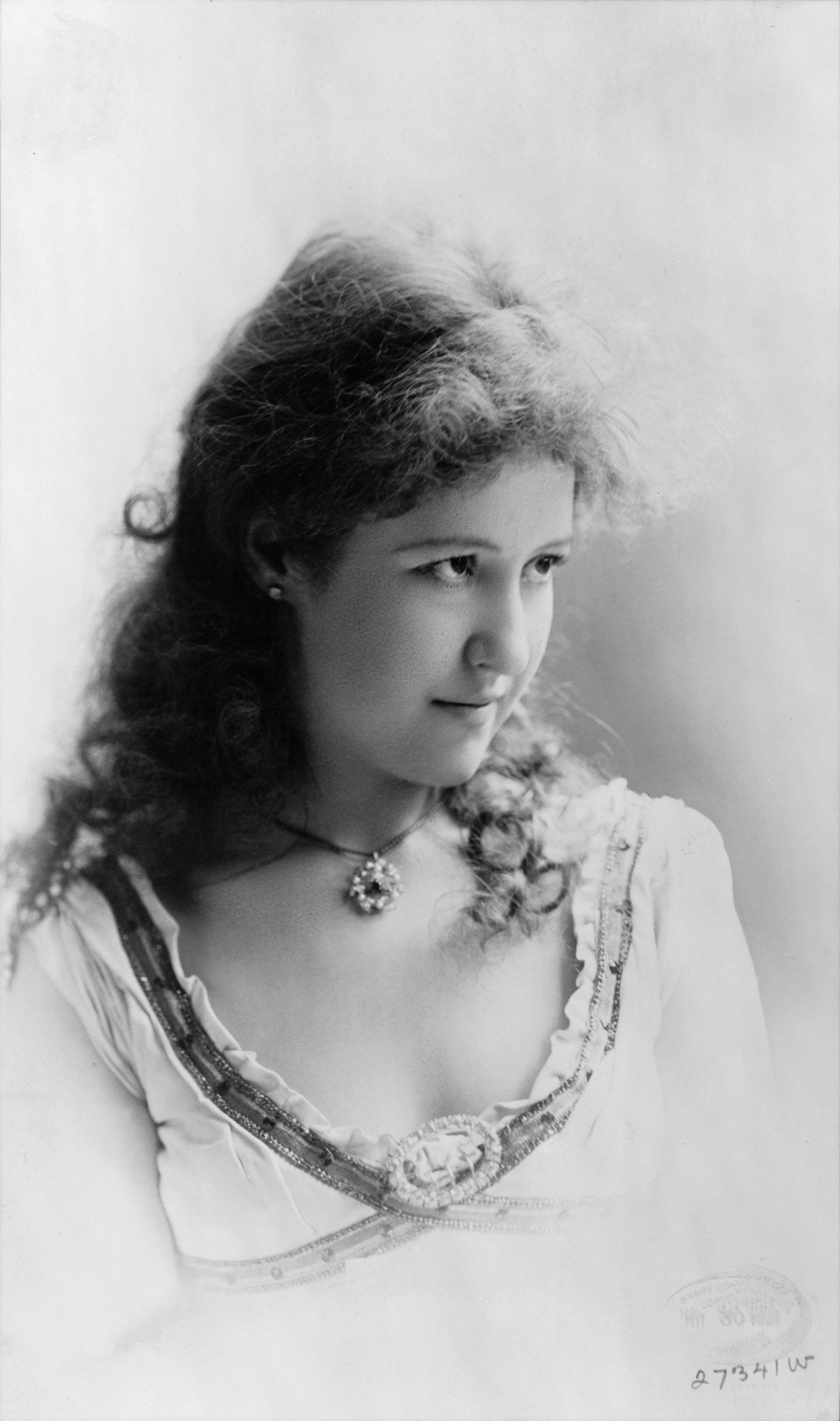 Louise Beaudet